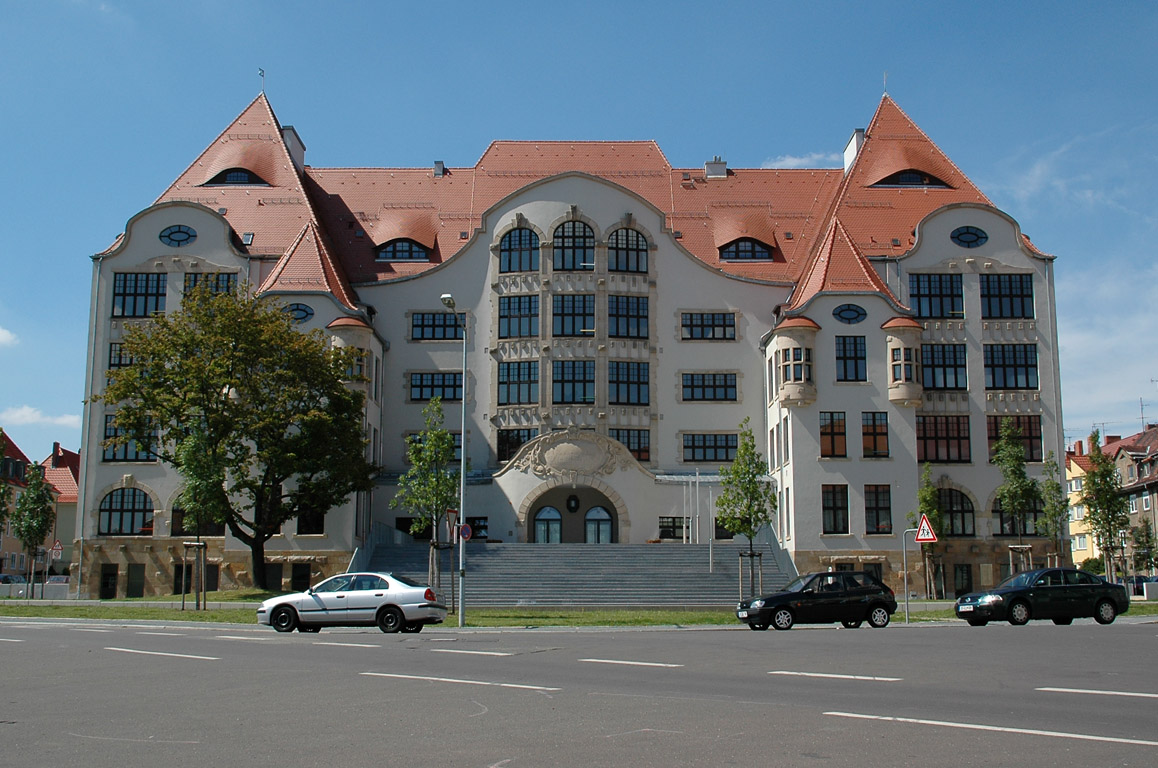 Frontansicht des Johannes-Gutenberg-Gymnasiums (errichtet zwischen 1906 und 1909)